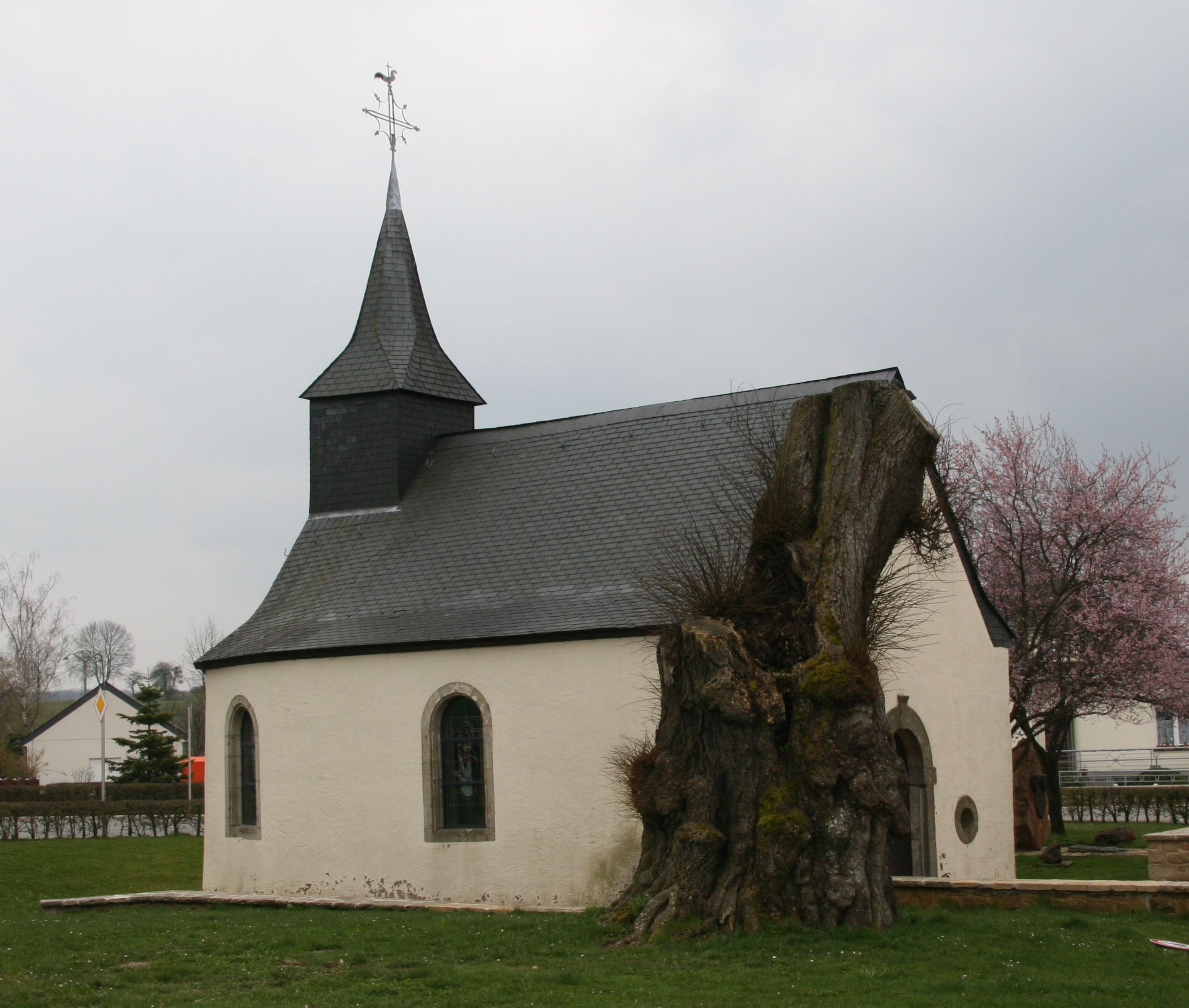 D'Lann vu Kënzeg liewt nach.